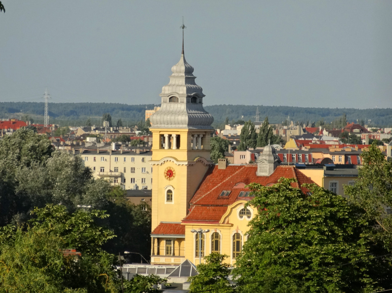 Widok ze skrzyżowania ulic: Seminaryjnej, Wysokiej, Lubelskiej i Na Wzgórzu na osiedlu Wilczak w Bydgoszczy